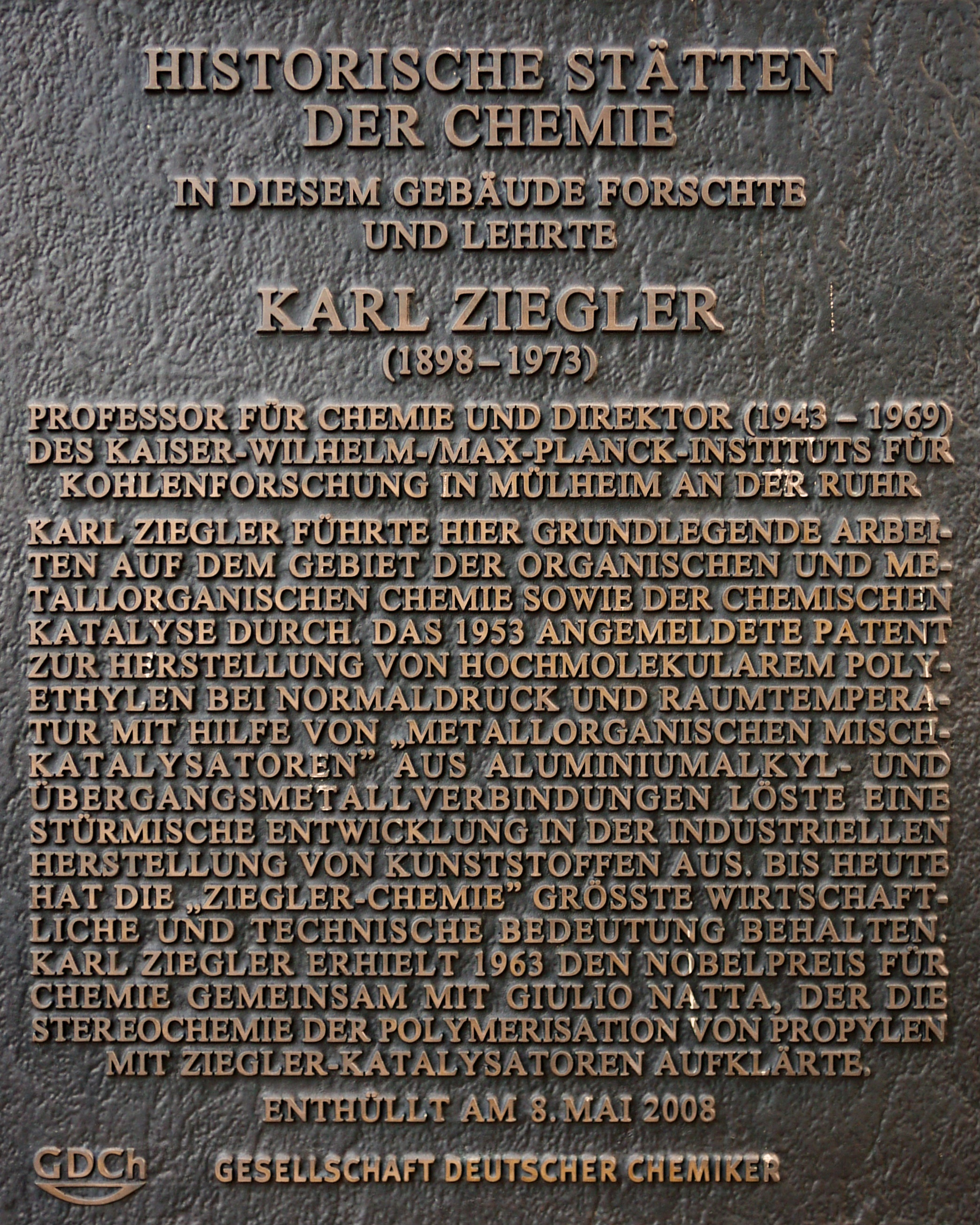 Gedenktafel "Historische Stätten der Chemie" der GDCh zu Ehren Karl Zieglers am MPI für Kohlenforschung, Mülheim an der Ruhr